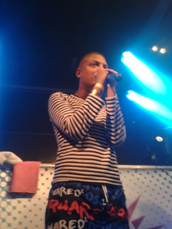 Ronnie Flex in Fox Stadskanaal!